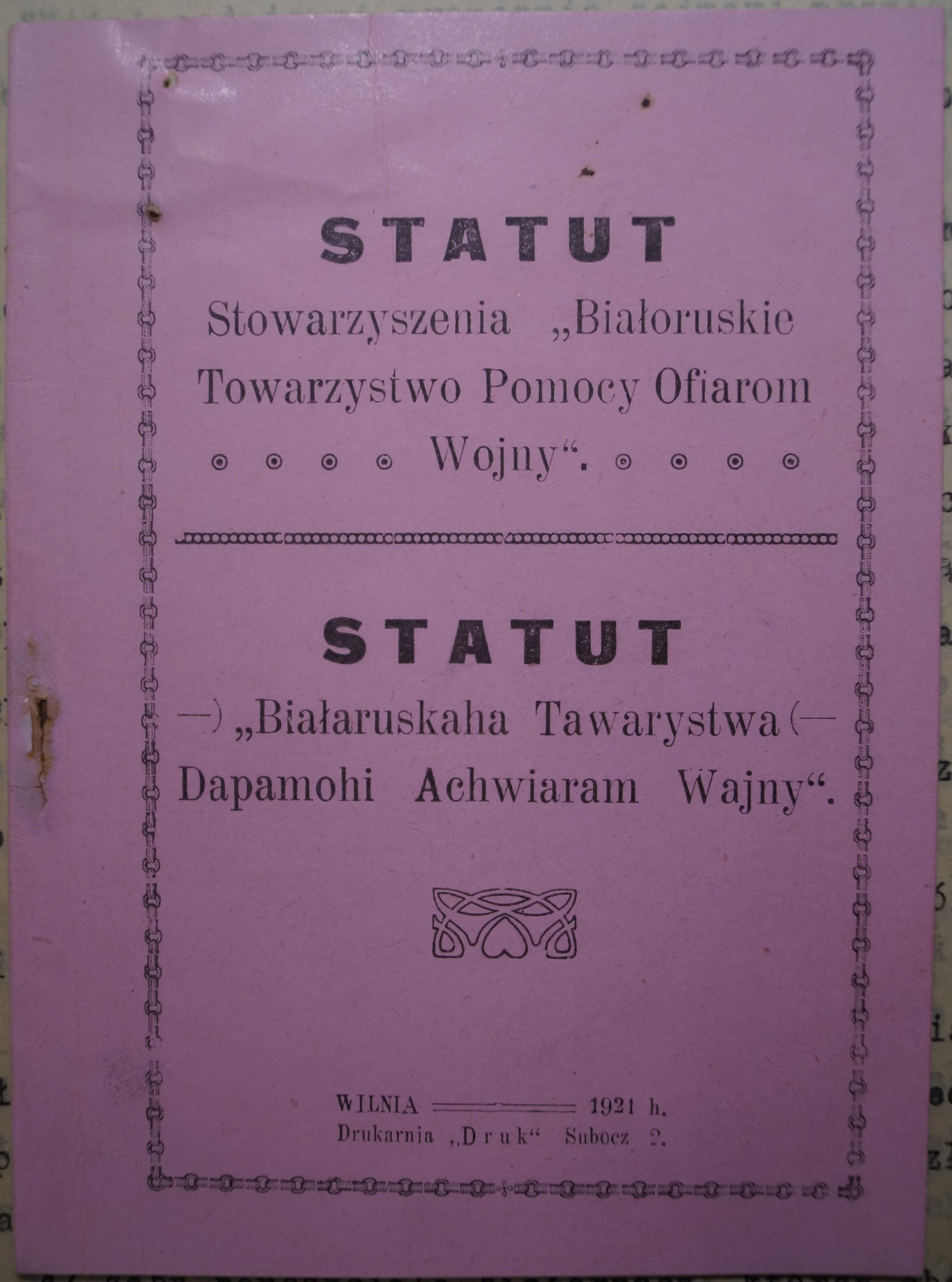 Статут Беларускага таварыства дапамогі ахвярам вайны